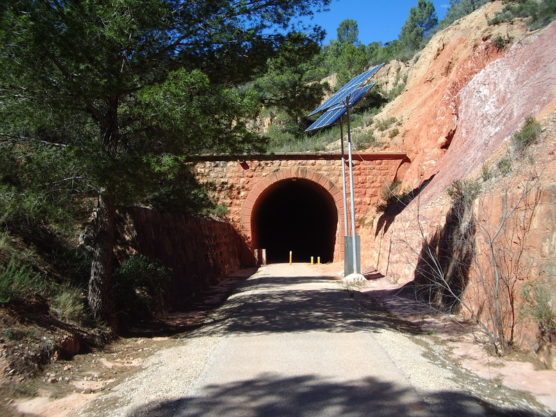 Durch Fotovoltaik beleuchteter Tunnel am VIa Verde de la Terra Alta Sonstiges: ...